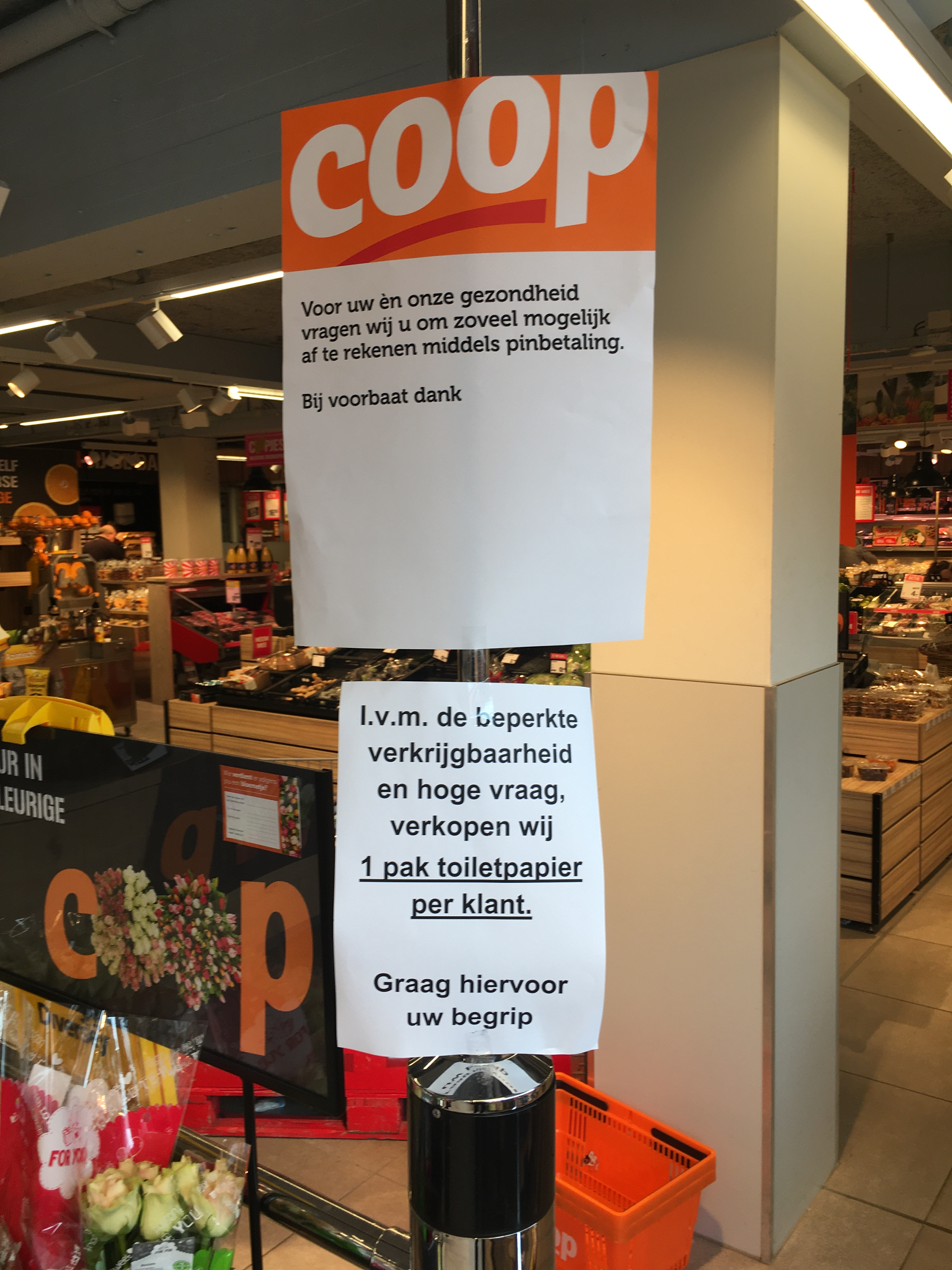 Maatregelen omtrent COVID-19 in een Coop supermarkt in Delft